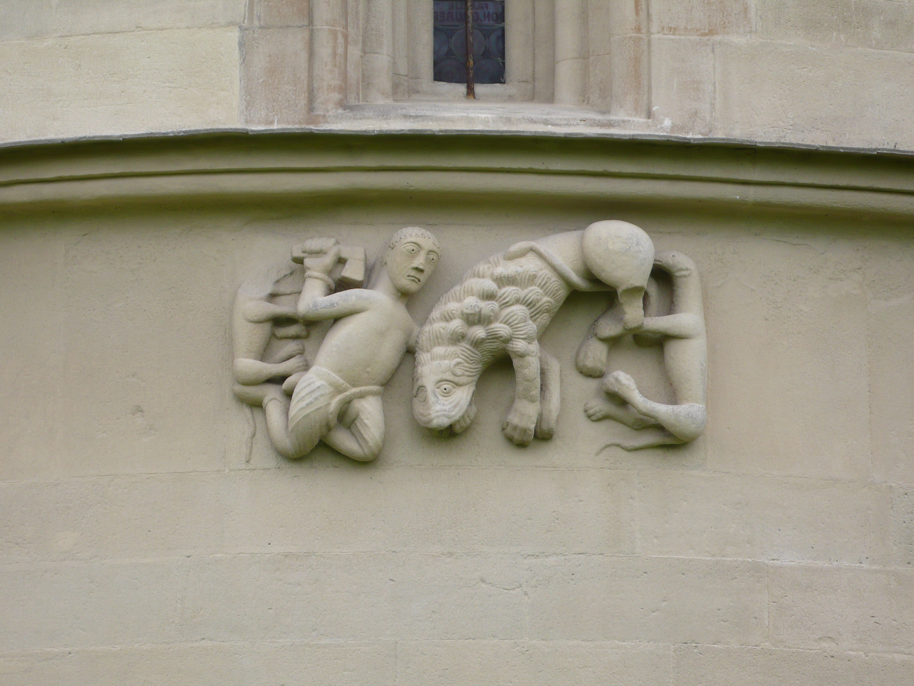 Schöngrabern, Niederösterreich, spätromanische Pfarrkirche, Apsis, Reliefdarstellungen